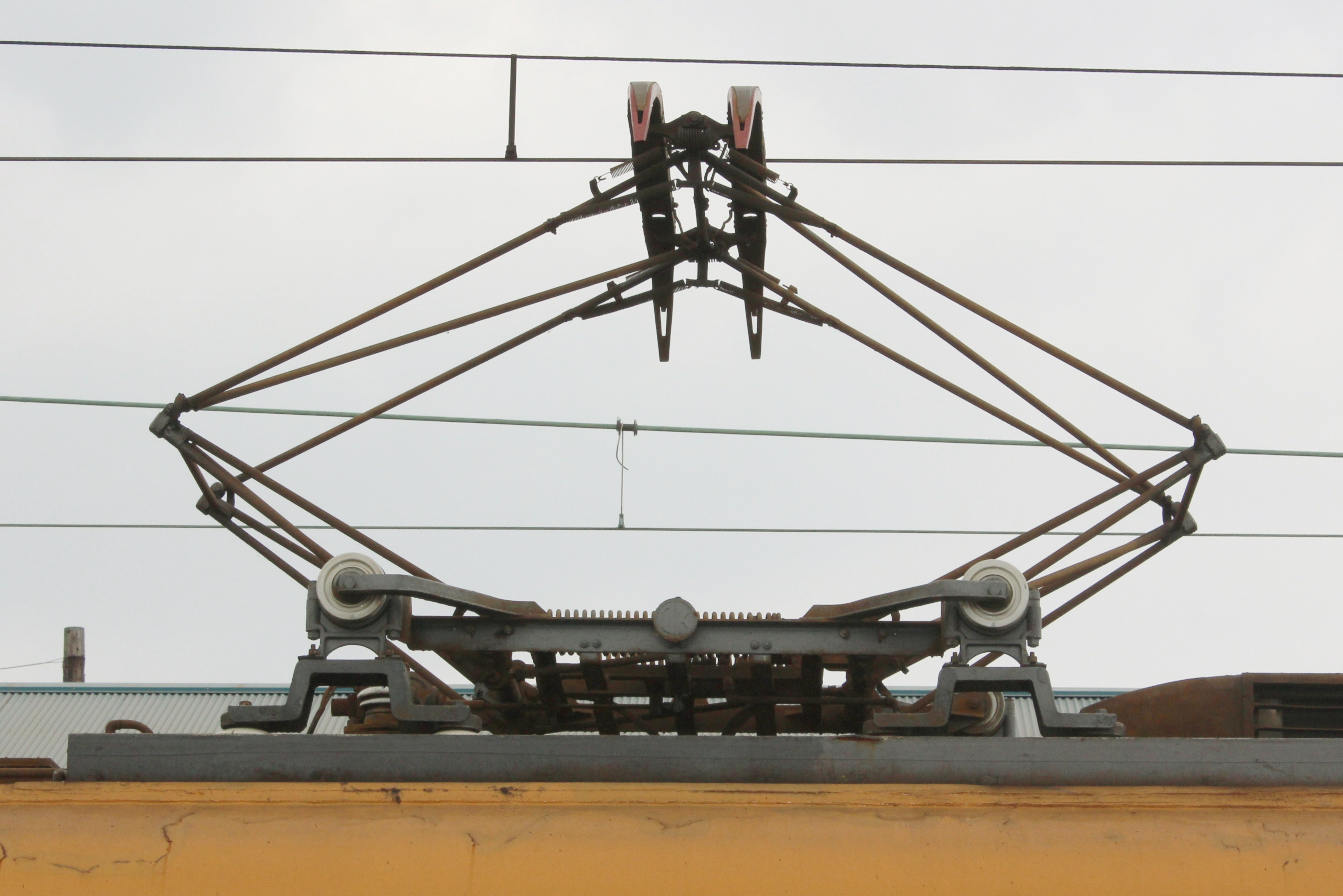 近鉄16000系（現大井川鉄道16000系）PT-42形パンタグラフ